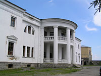 Палац графа Ксідо